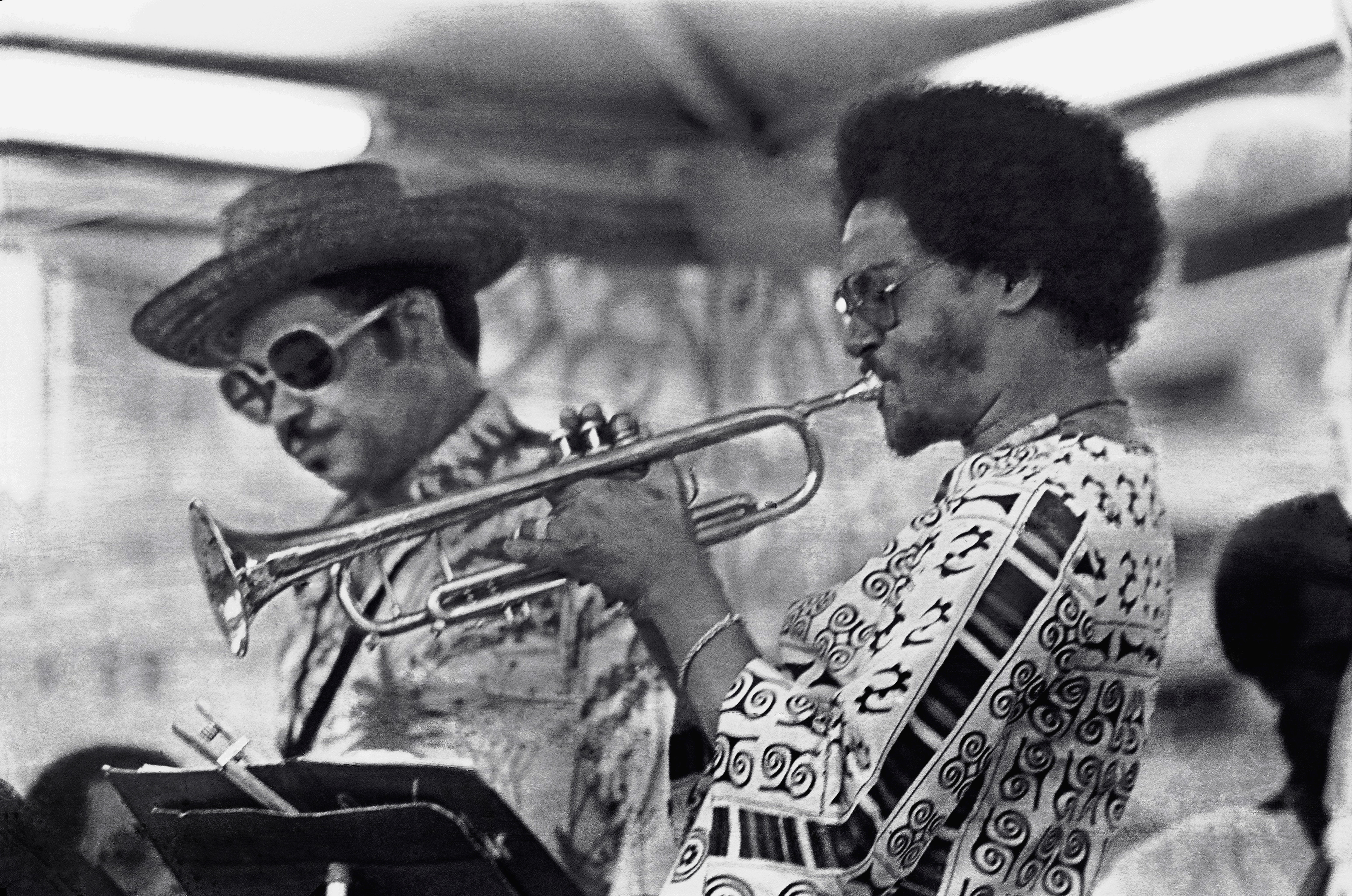 Frank Wess (left) and Jimmy Owens Rochester NY August 1977